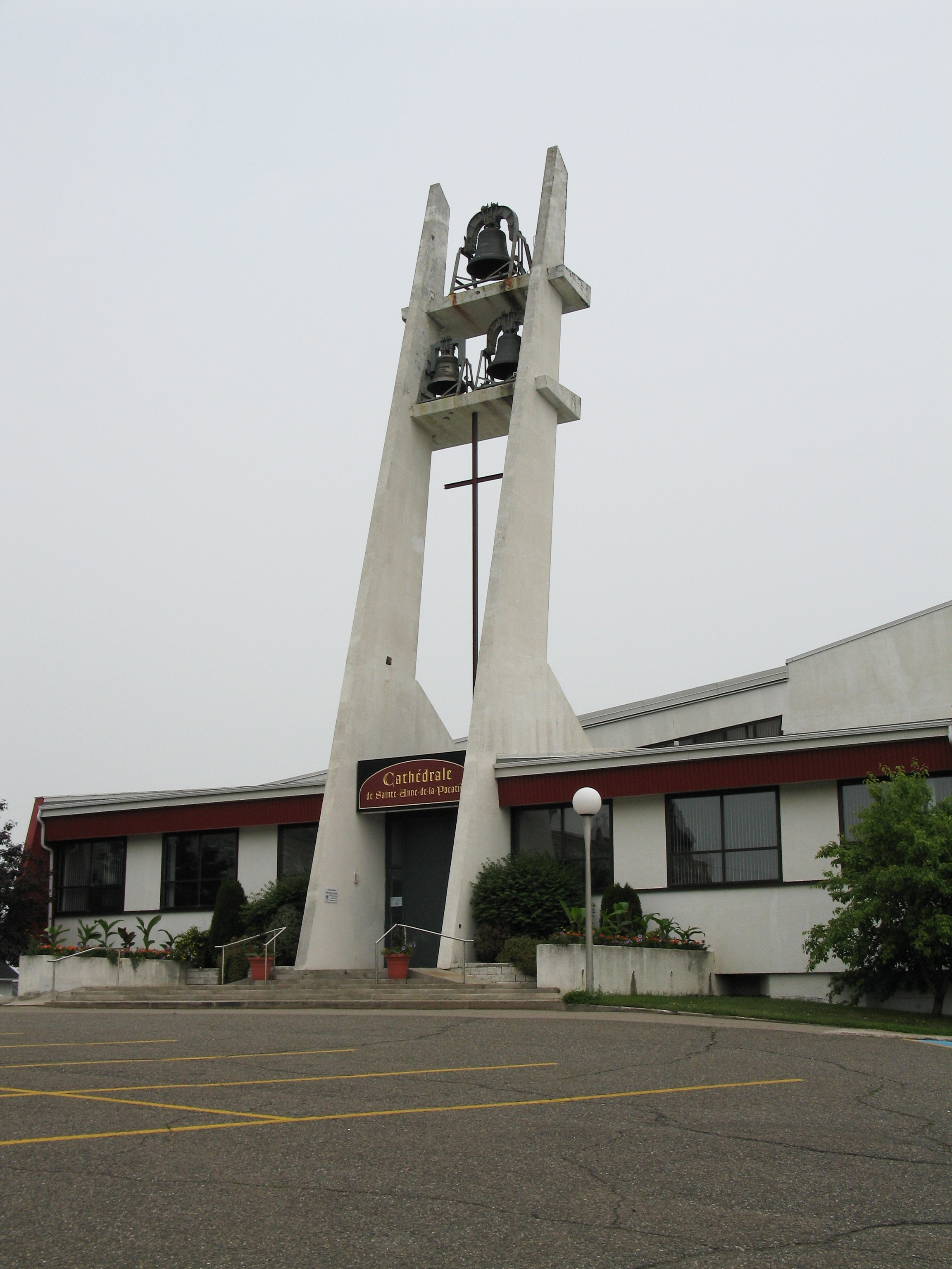 La cathédrale Sainte-Anne-de-la-Pocatière, siège du diocèse catholique de La Pocatière au Québec.